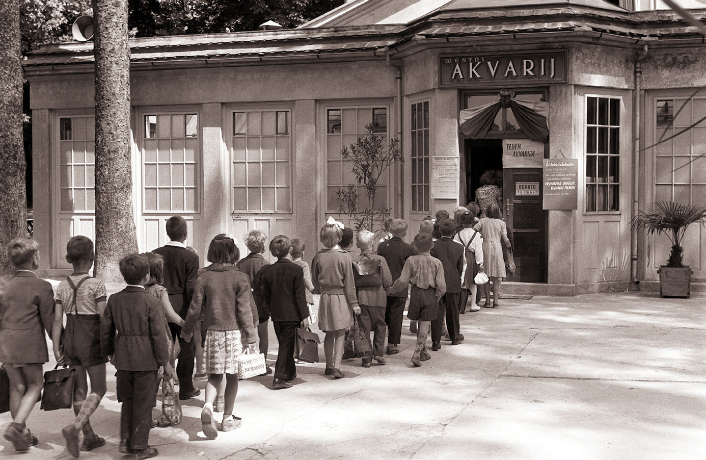 Šolarji na obisku v mariborskem Akvariju